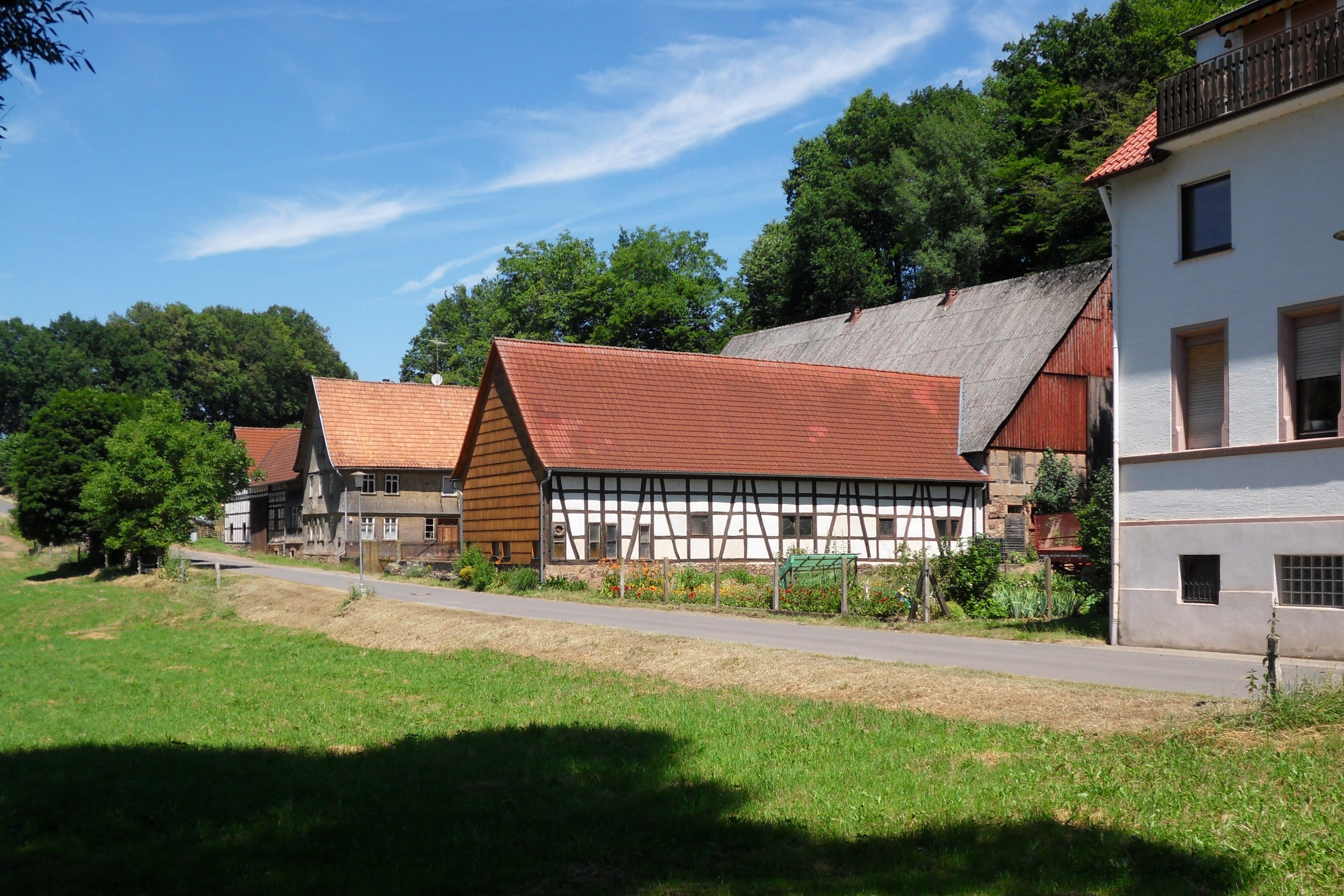 Der Schulzenhof in Affhöllerbach, eine stattliche denkmalgeschützte Hofanlage in landschaftlich reizvoller Lage außerhalb des Dorfes in der Kilsbacher Straße, Blick von Süden